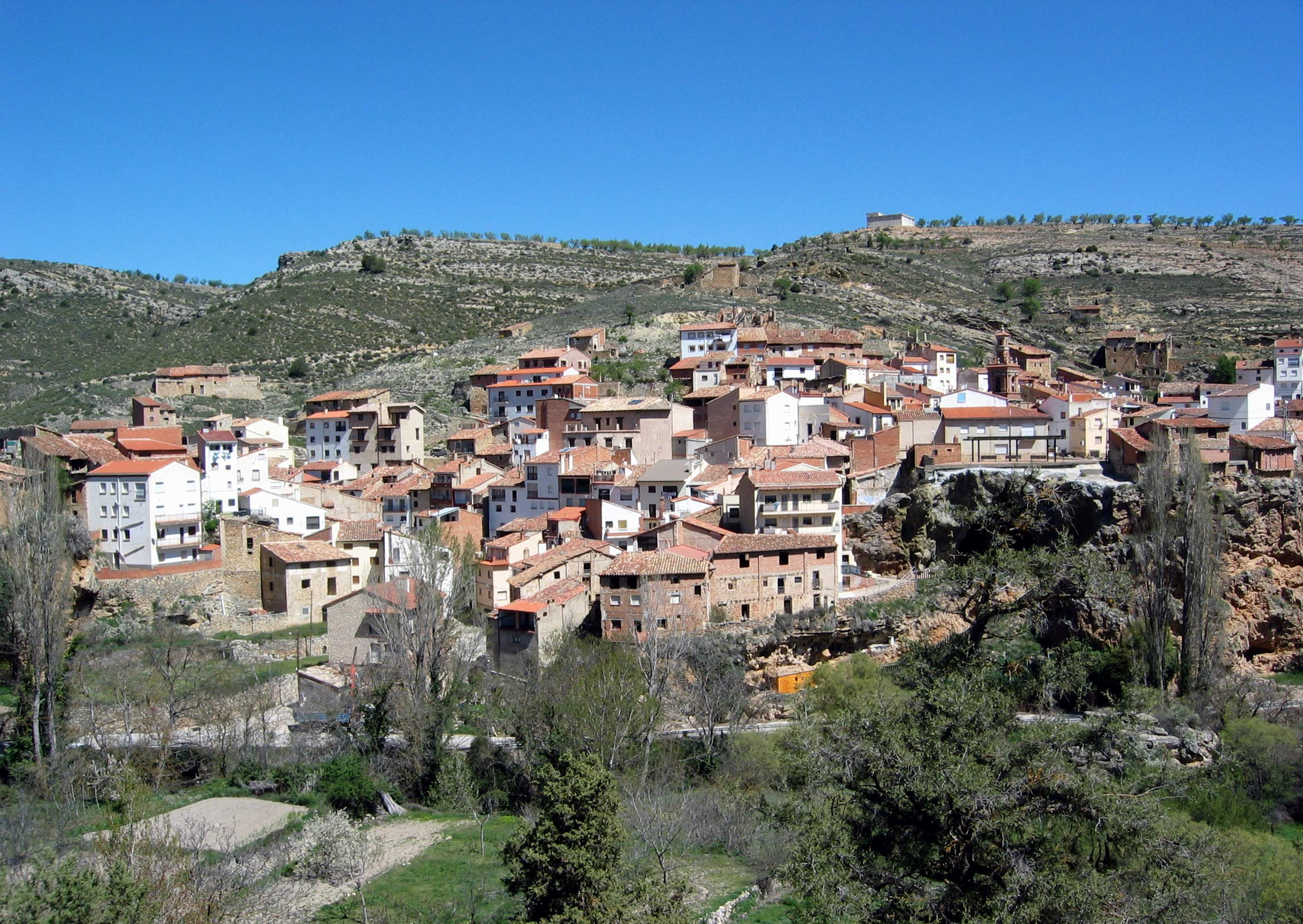 Vista general (meridional) de Vallanca (Valencia), desde el cerro frontero.